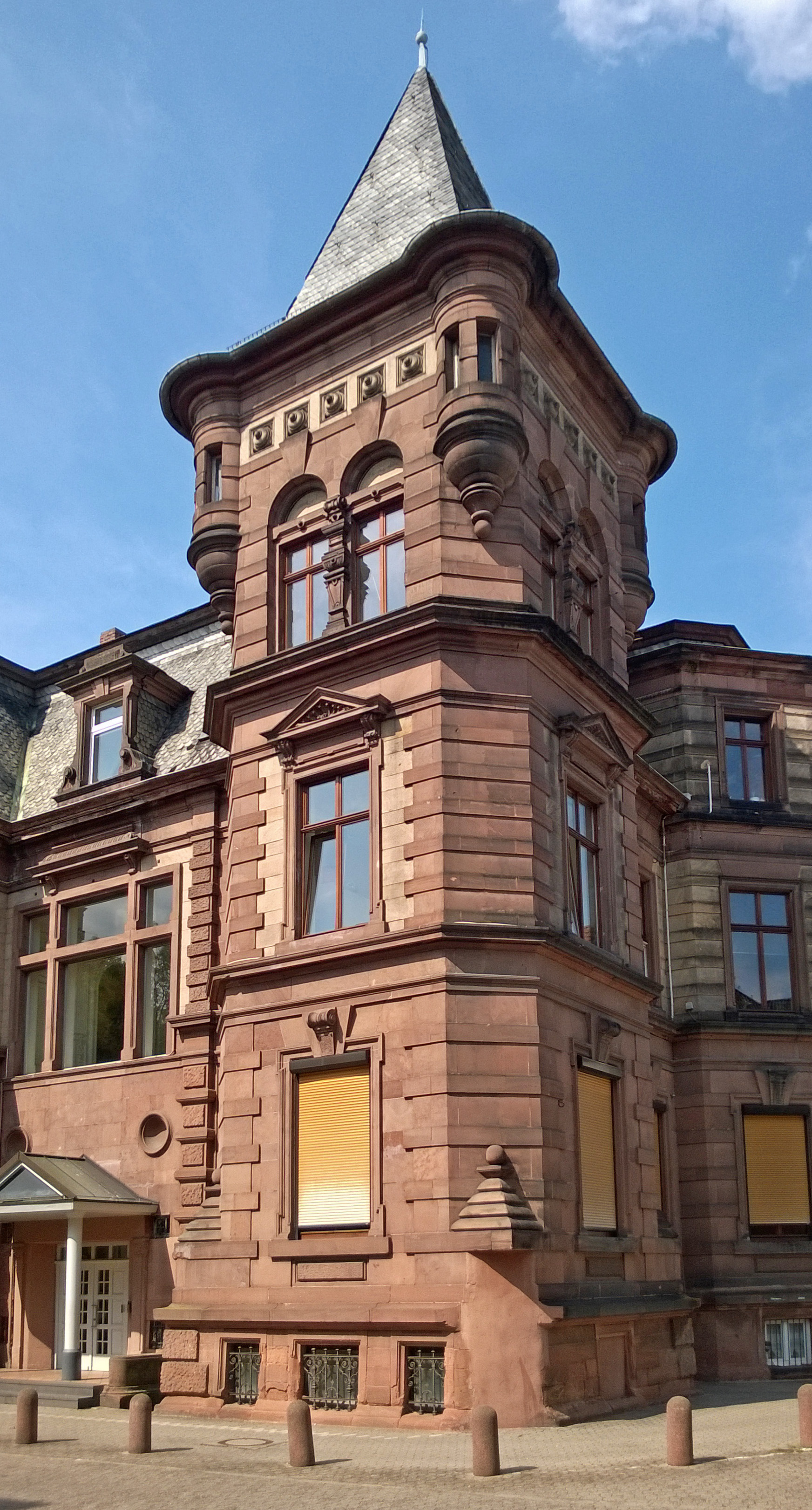 Wasserturm als Bestandteil der ehemaligen Villa Enzinger in der Karmeliterstraße 6, Worms